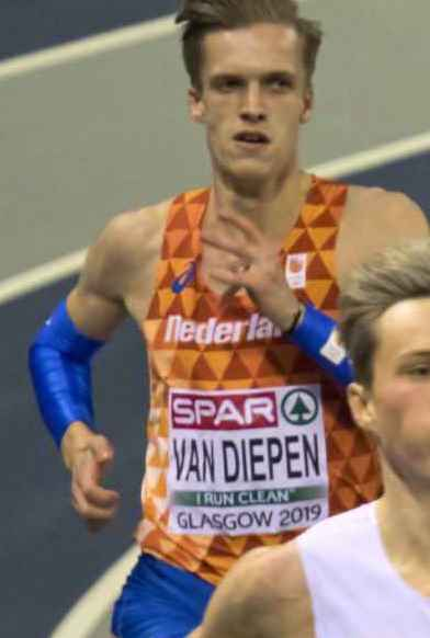 EKI20508 finale 400m warholm van diepen